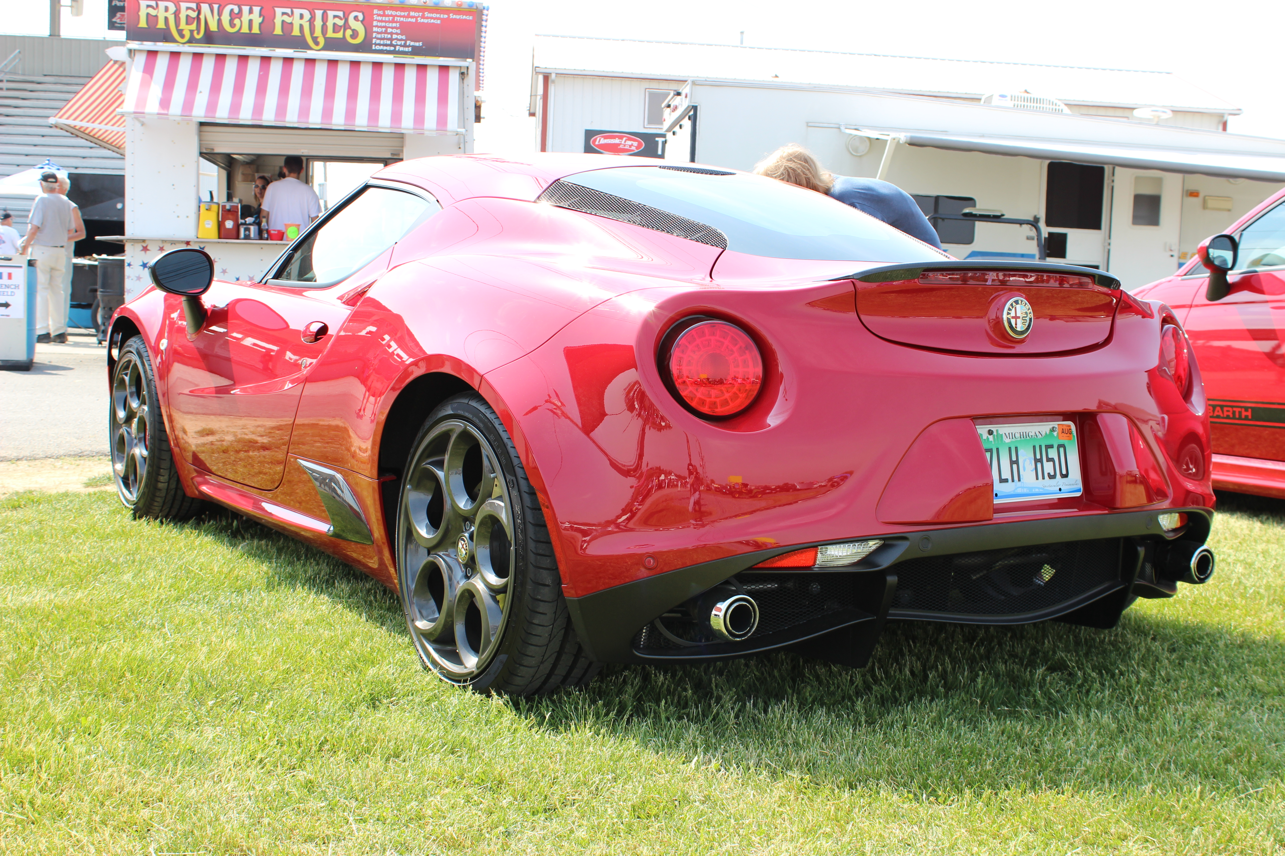 Alfa Romeo 4C